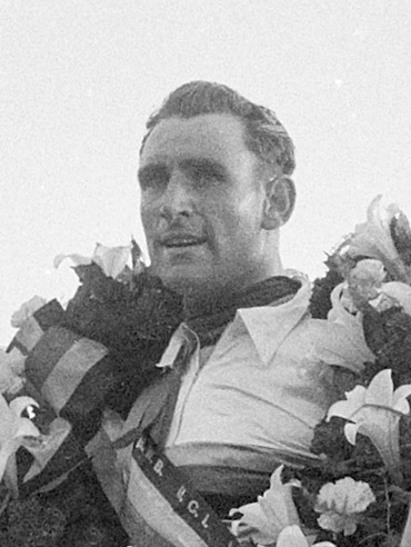 Wereldkampioenschappen wielrennen amateurs op de weg. Louis Proost (1e) wereldkampioen